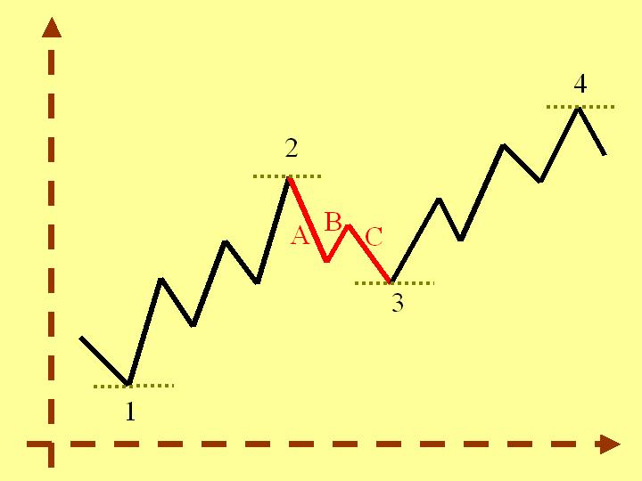 Diagrama básico de tendencias de largo, mediano y corto plazo